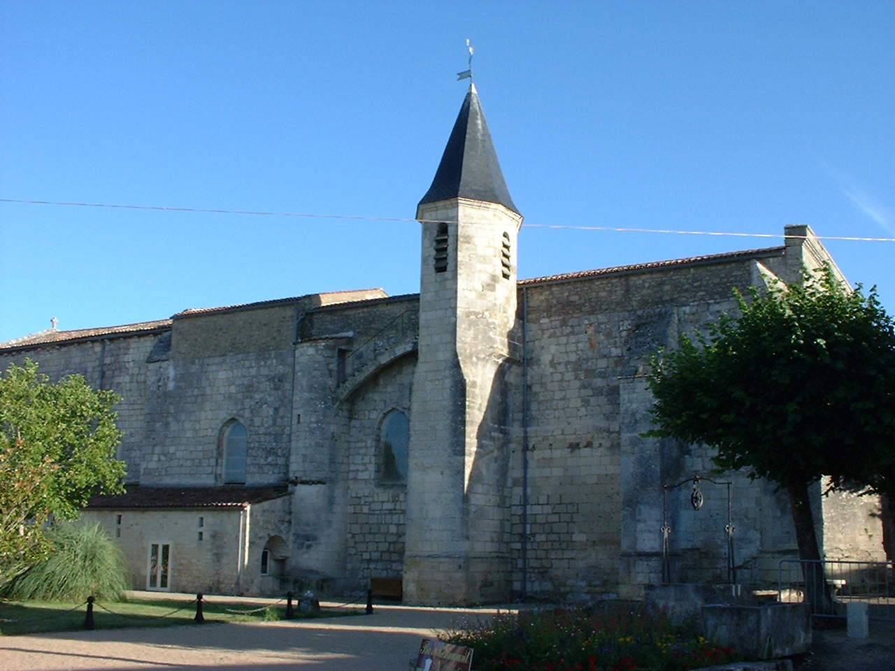 Église saint Vincent d'Épargnes Photographie personelle du 13 aout 2004 à 19h36 NaSH 15 août 2004 à 19:07 (CEST)